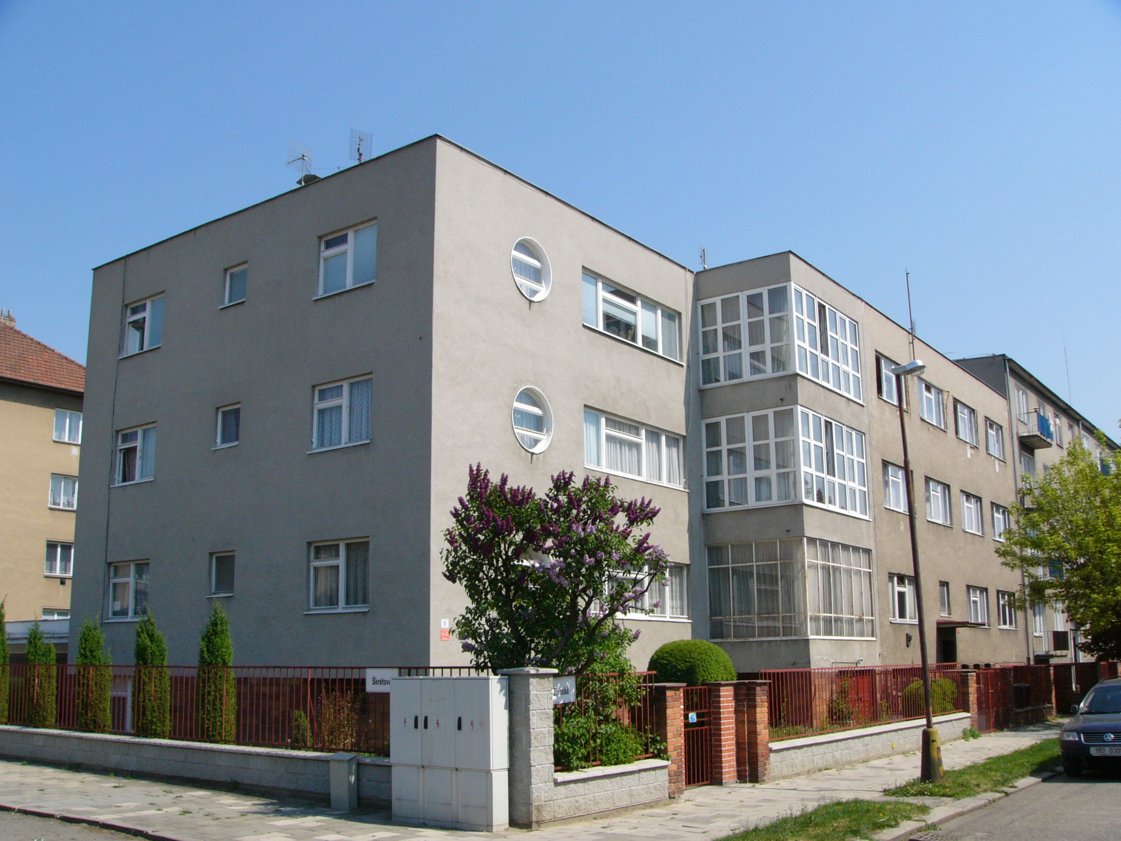 Nájemní vila manžželů Handlových, Žilinská 20, Olomouc (vlevo). Nemovitá památka zapsaná jako: Činžovní dům (Olomouc), Žilinská 650/20, Olomouc. Klasický nájemní dům manželů Vávrových, Žilinská 18, Olomouc (vpravo). Nemovitá památka zapsaná jako: Žilinská 649/18, Olomouc. - Architekt obou staveb: Lubomír ŠŠlapeta. Rok dokončení: 1938.